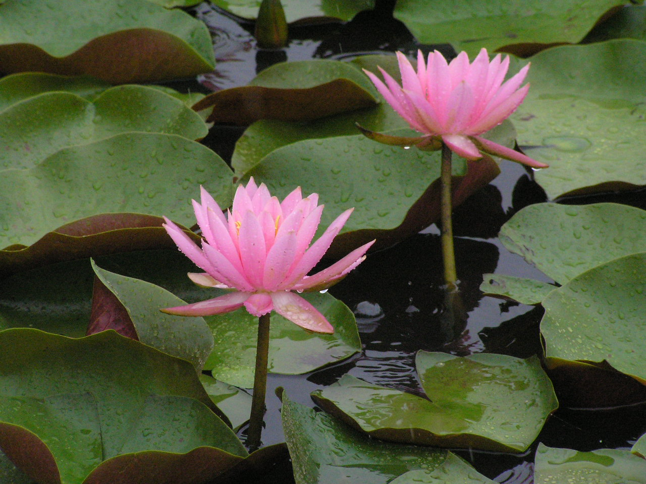 ハス 【おぉたむ すねィく探検隊】写真部門 担当 大原佳苗 ～photo by Autumn Snake